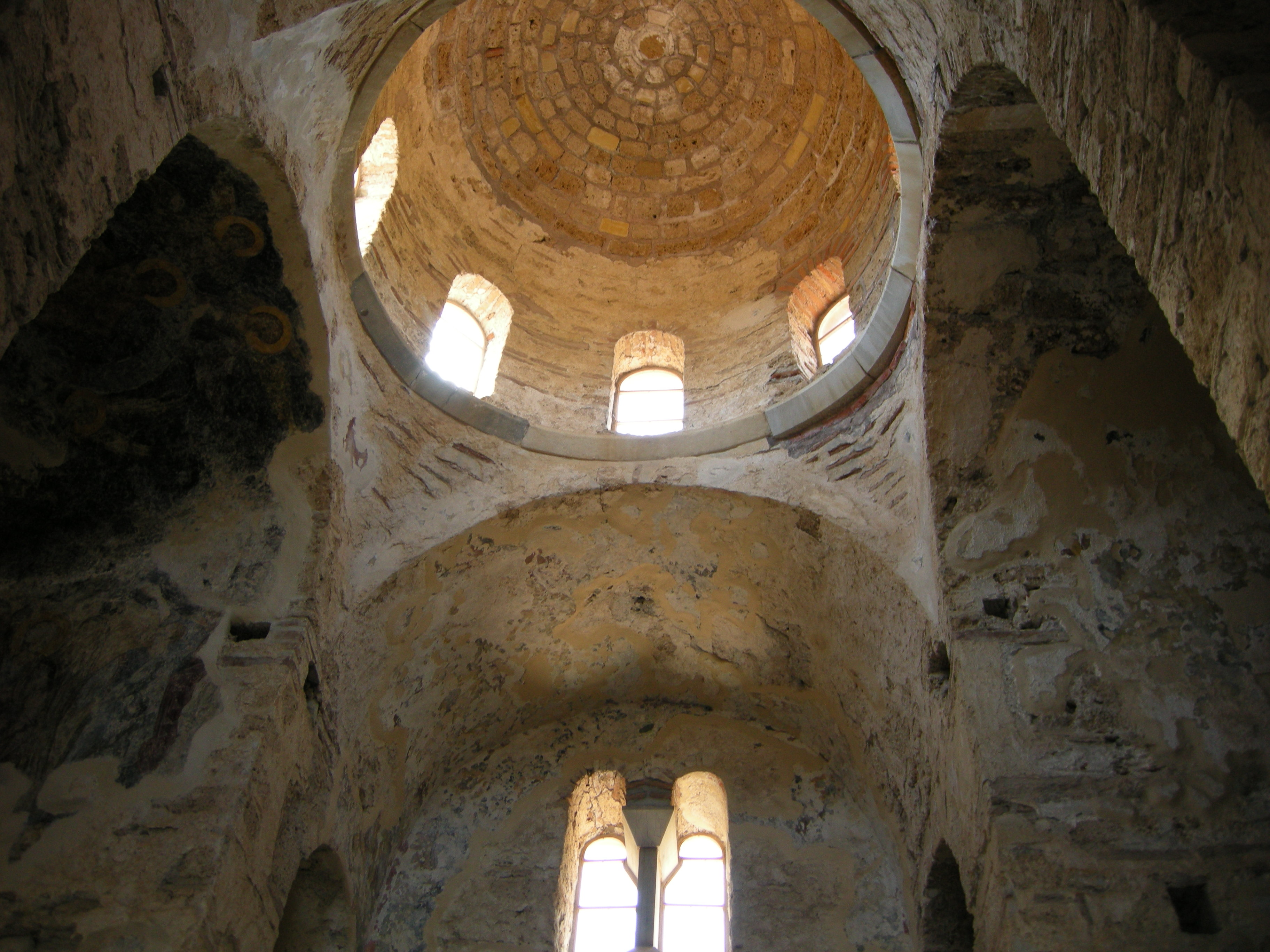 Mystras, agia sophia, inside, dome